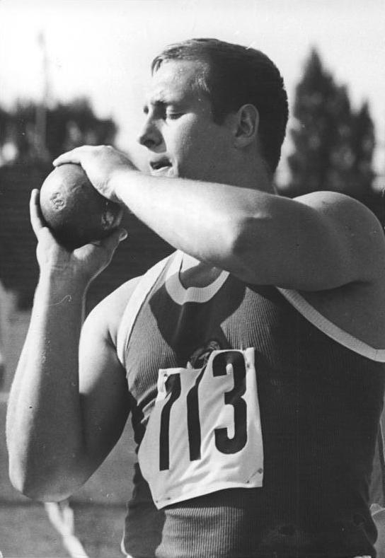 Dieter Hoffmann Zentralbild KohlsMa. 04.07.1968 Potsdam: Dieter Hoffmann stieß Europarekord. Einen neuen Europarekord im Kugelstoßen stellte der 26jährige Dieter Hoffmann (ASK Vorwärts Potsdam-Archivfoto) am 03.07.1968 bei Leichtathletik-Wettbewerben in Potsdam auf. Der 1,89 m große und 120 kg schwere Potsdamer kam auf 20,08 m und löste damit den bisherigen Rekordhalter Eduard Guschtschin (UdSSR-19,64 m) ab.